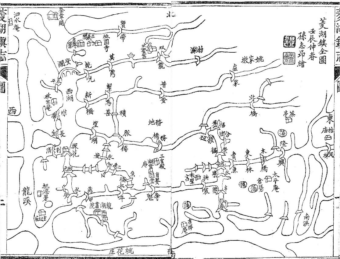 掃描于《菱湖鎮志》（光緒十九年，即公元1893年）。